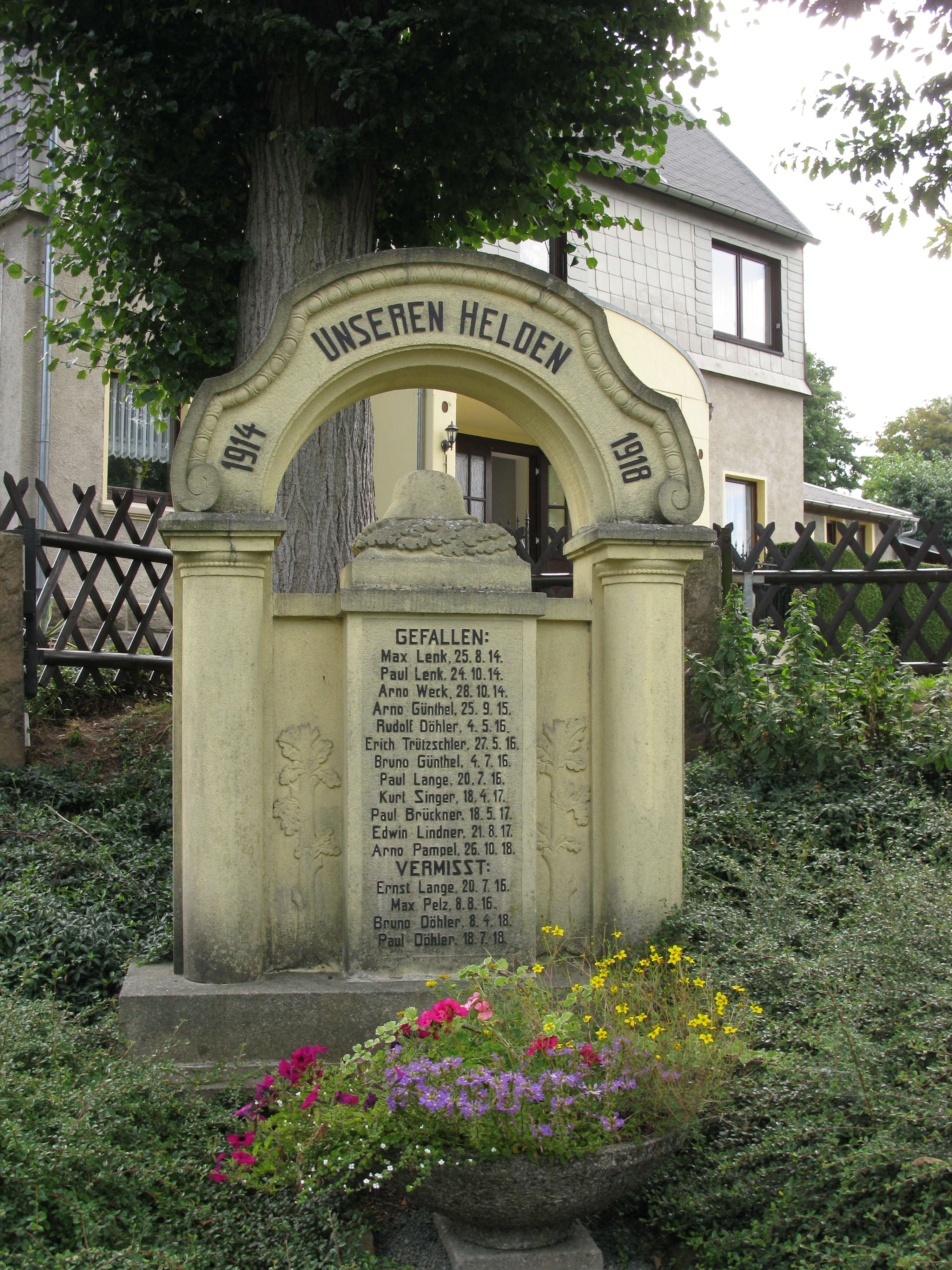 Lengenfeld (Vogtland): Kriegerdenkmal im Ortsteil Pechtelsgrün